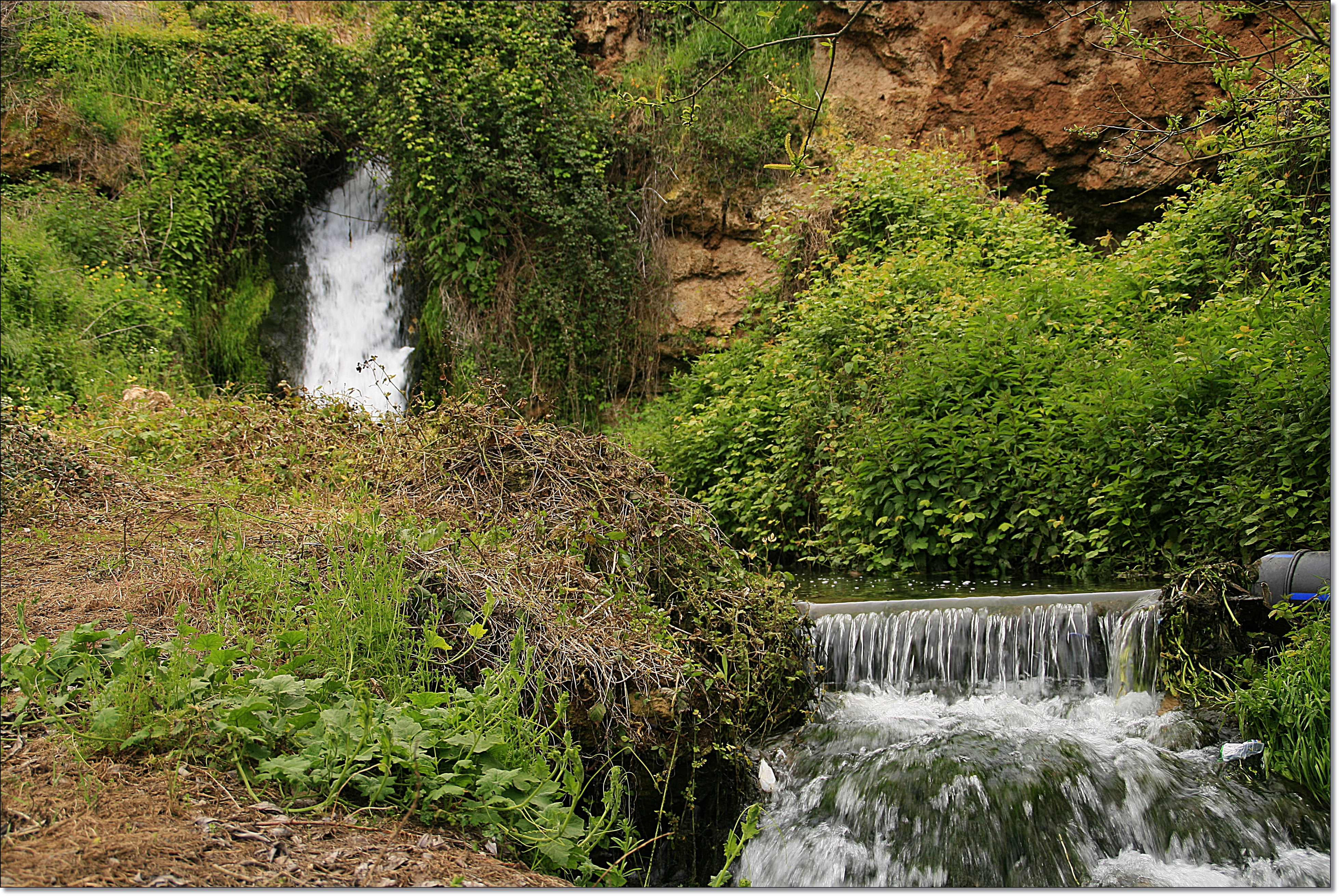 El río Queiles a su paso por Ágreda, Soria. (España)